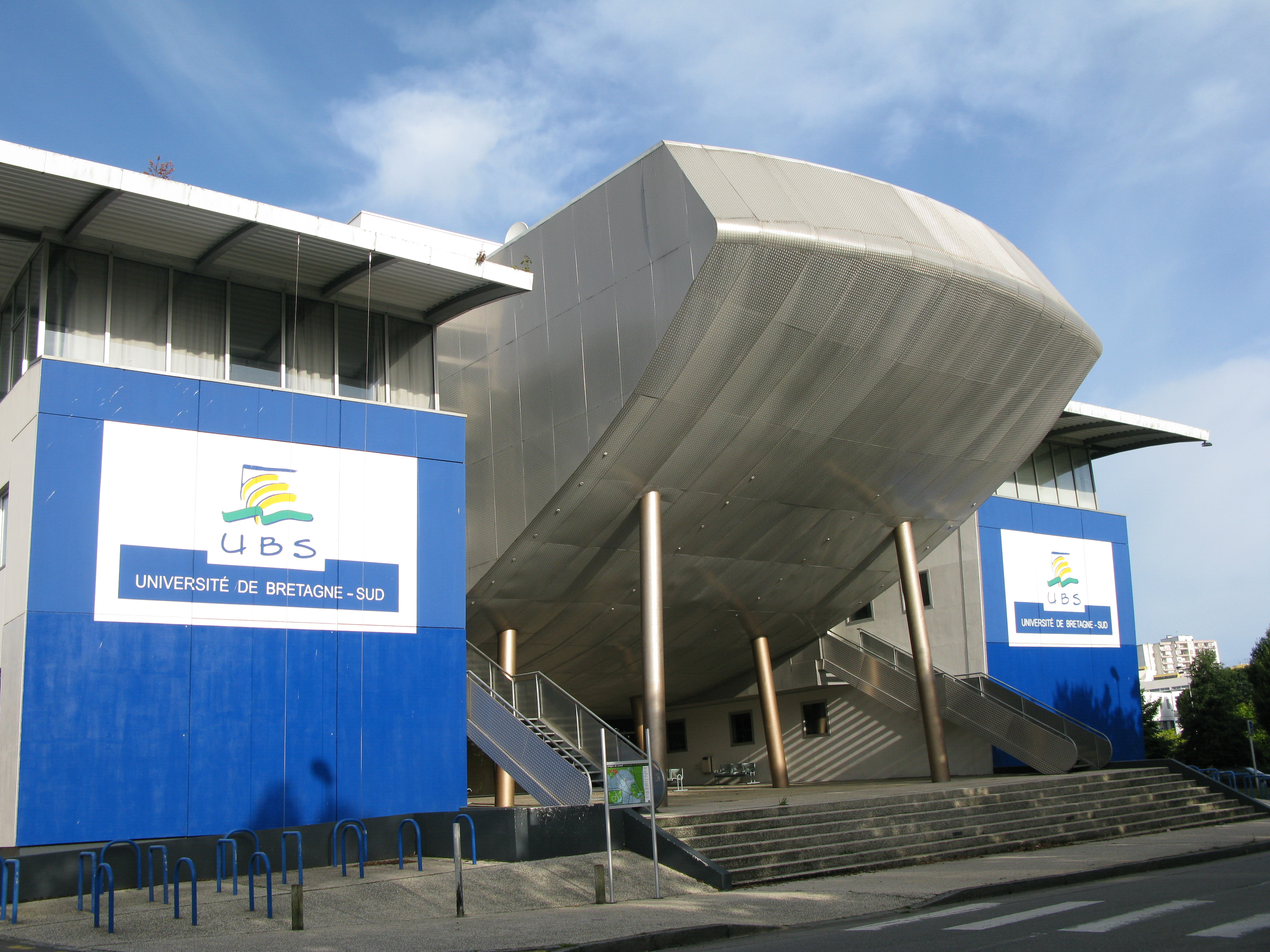 Université de Bretagne Sud à Lorient, entrée du bâtiment de Lettres, Langues, Sciences humaines et sociales .